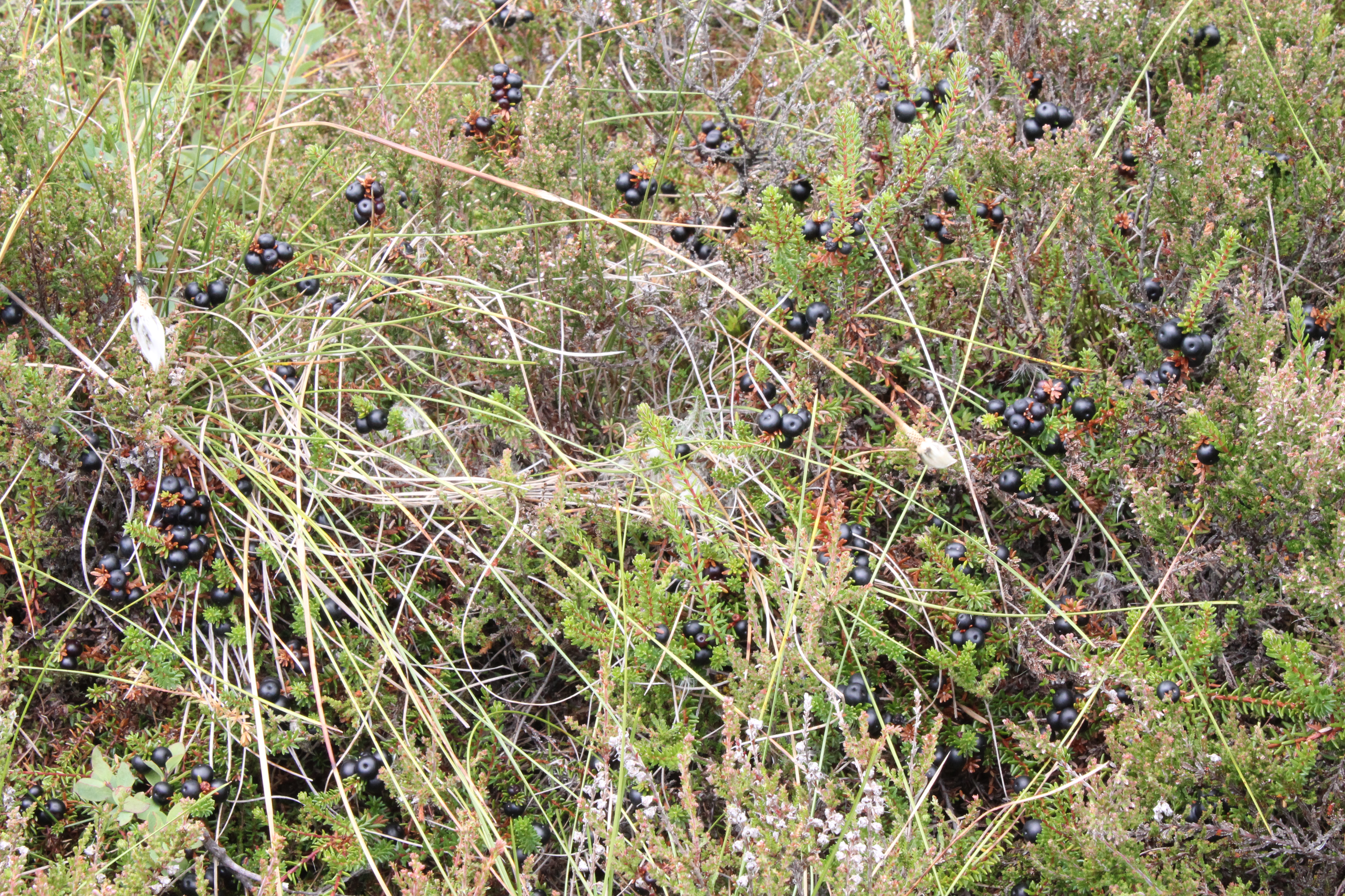 Schwarze Krähenbeere im Schwarzen Moor in der Rhön, Germany Azərbaycanca=Empetrum nigrum Català=Empetrum nigrum Česky=Šicha černá Dansk=Almindelig Revling English=Empetrum nigrum Español=Empetrum nigrum Suomi=Variksenmarja Français=Empetrum nigrum Iñupiak=Paunġaq 日本語=ガンコウラン 한국어=시로미 Перем Коми=Пончӧд Коми=Пончӧд Lietuvių=Juodoji varnauogė Nederlands=Kraaihei Norsk nynorsk=Krekling Norsk bokmål=Krekling Polski=Bażyna czarna Sámegiella=Čáhppesmuorji Seeltersk=Heedebäie (Empetrum) Svenska=Kråkbär Türkçe=Empetrum nigrum Tiếng Việt=Empetrum nigrum 中文=岩高兰